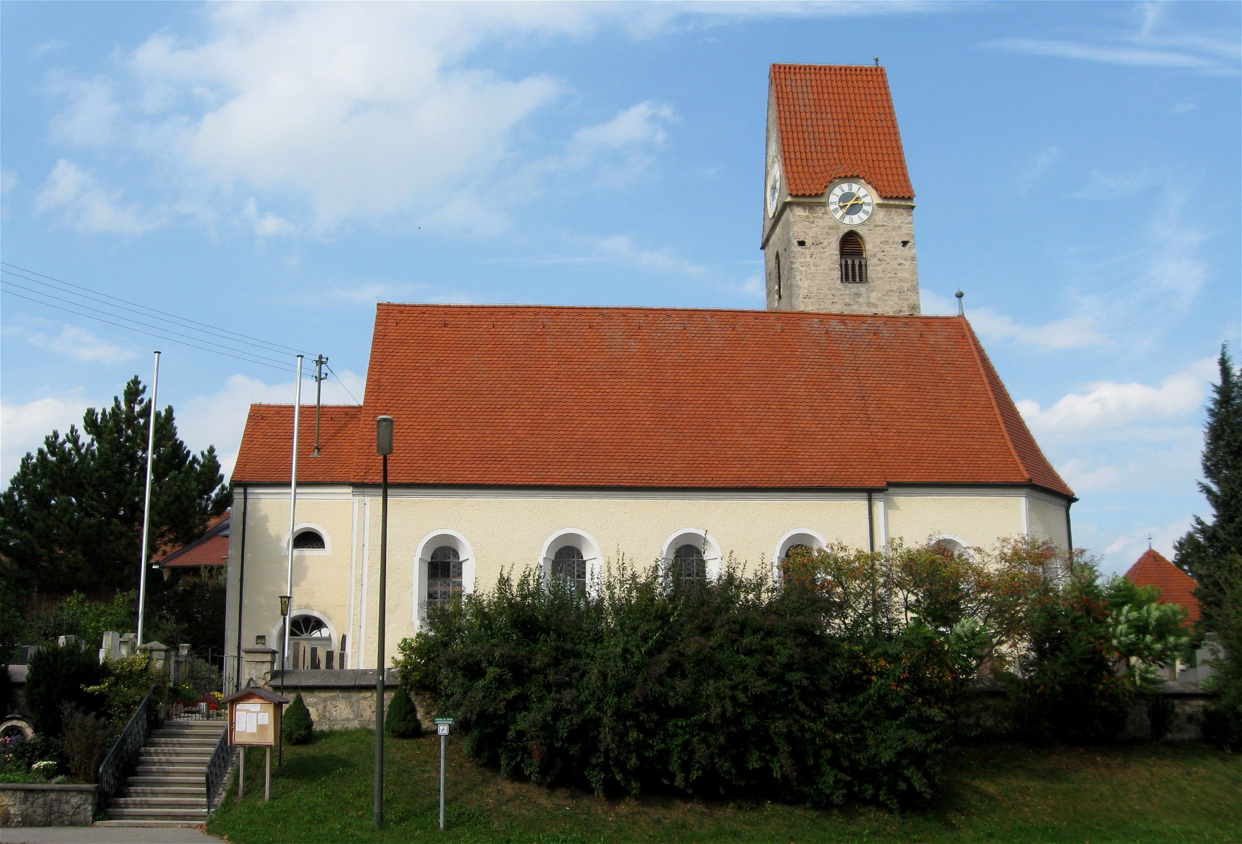 Pfarrkirche Heilig Kreuz, Tattenhausen, Großkarolinenfeld